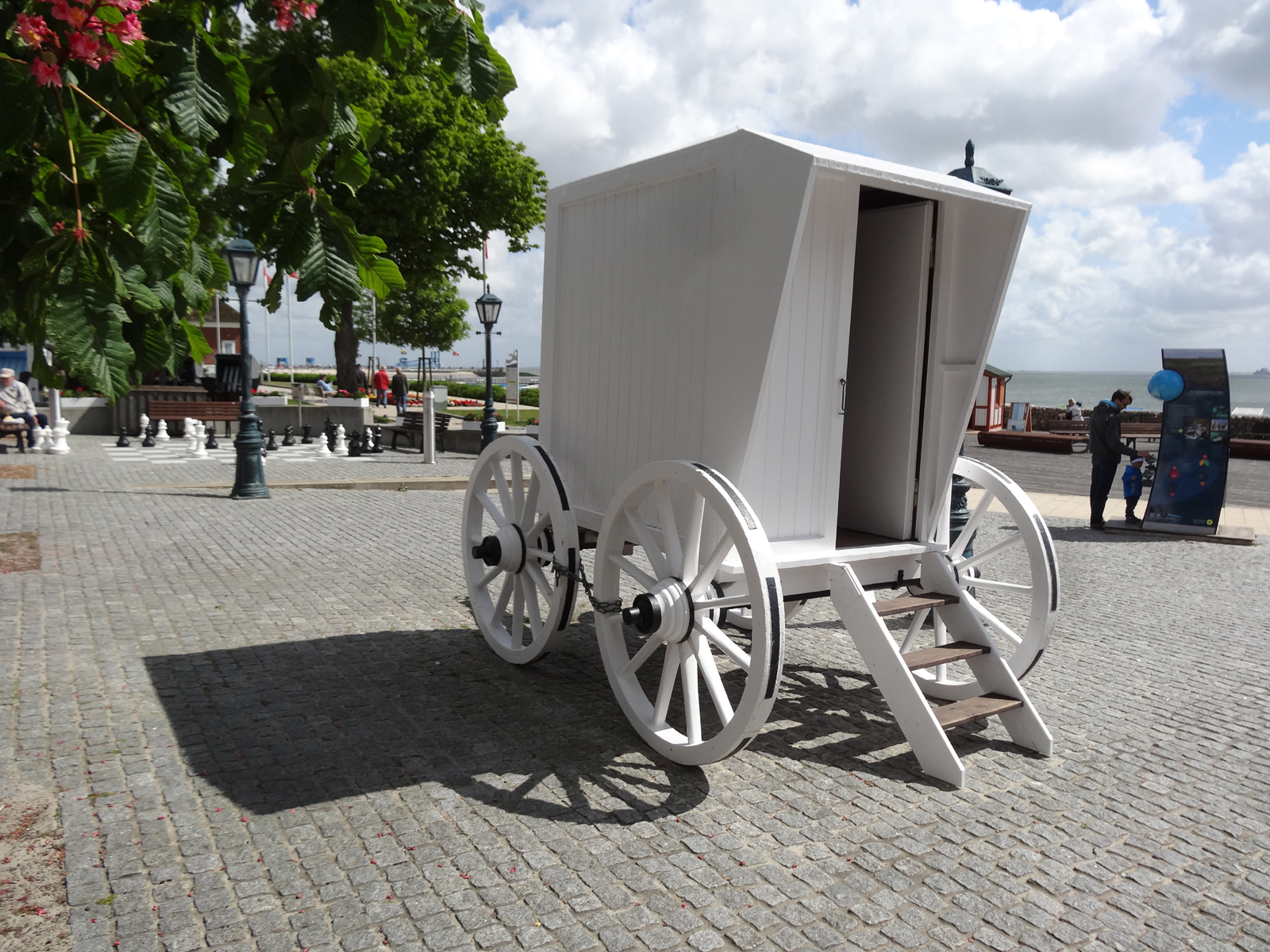 Badekarre auf Seepromade Sandwall in Wyk auf Föhr. Solche Modelle werden heute als Strandwärterhäuschen eingesetzt